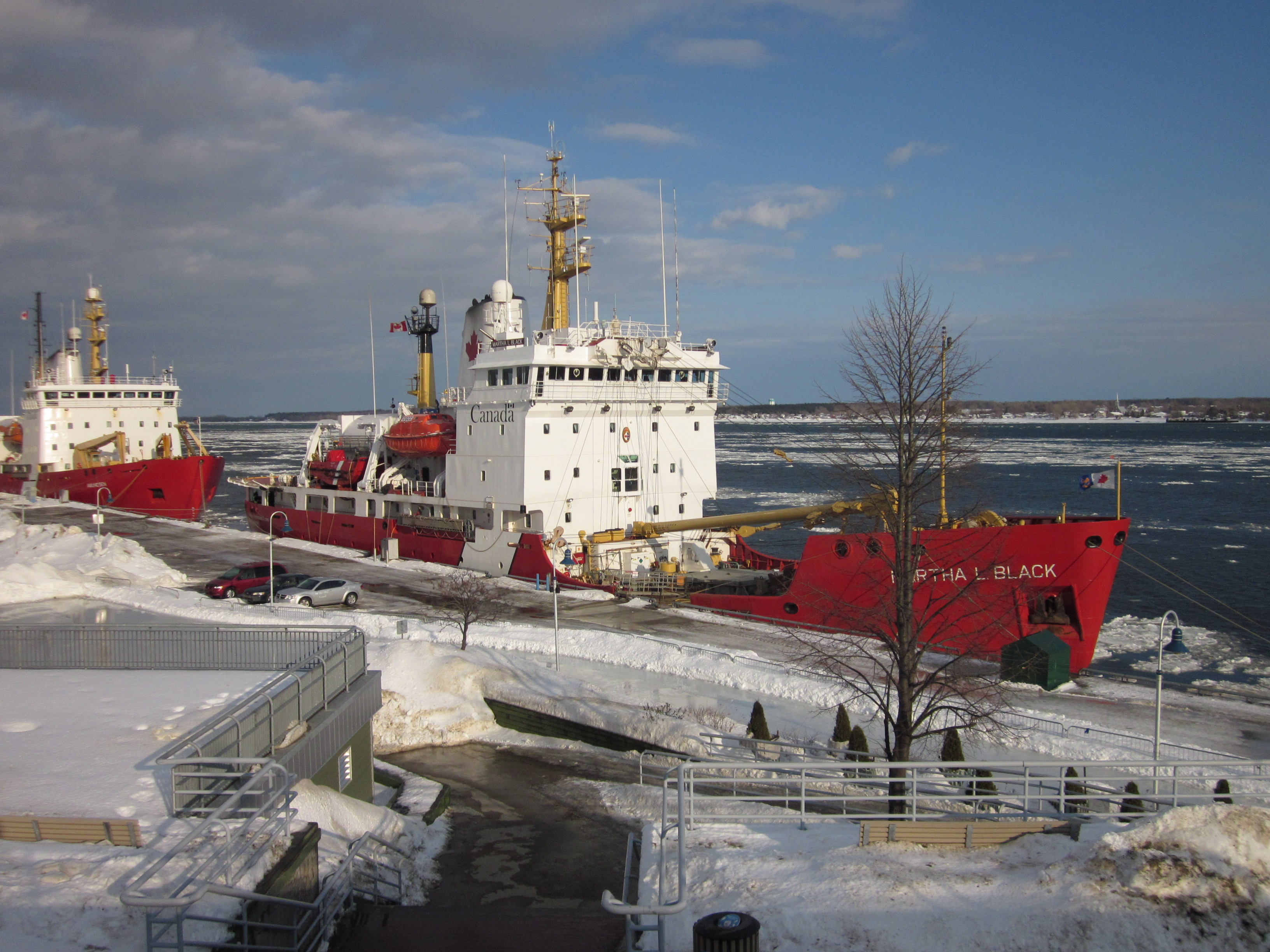 Le NGCC Martha L. Black au port de Trois-Rivières en mars 2012, le NGCC Amundsen est situé en arrière de celui-ci.